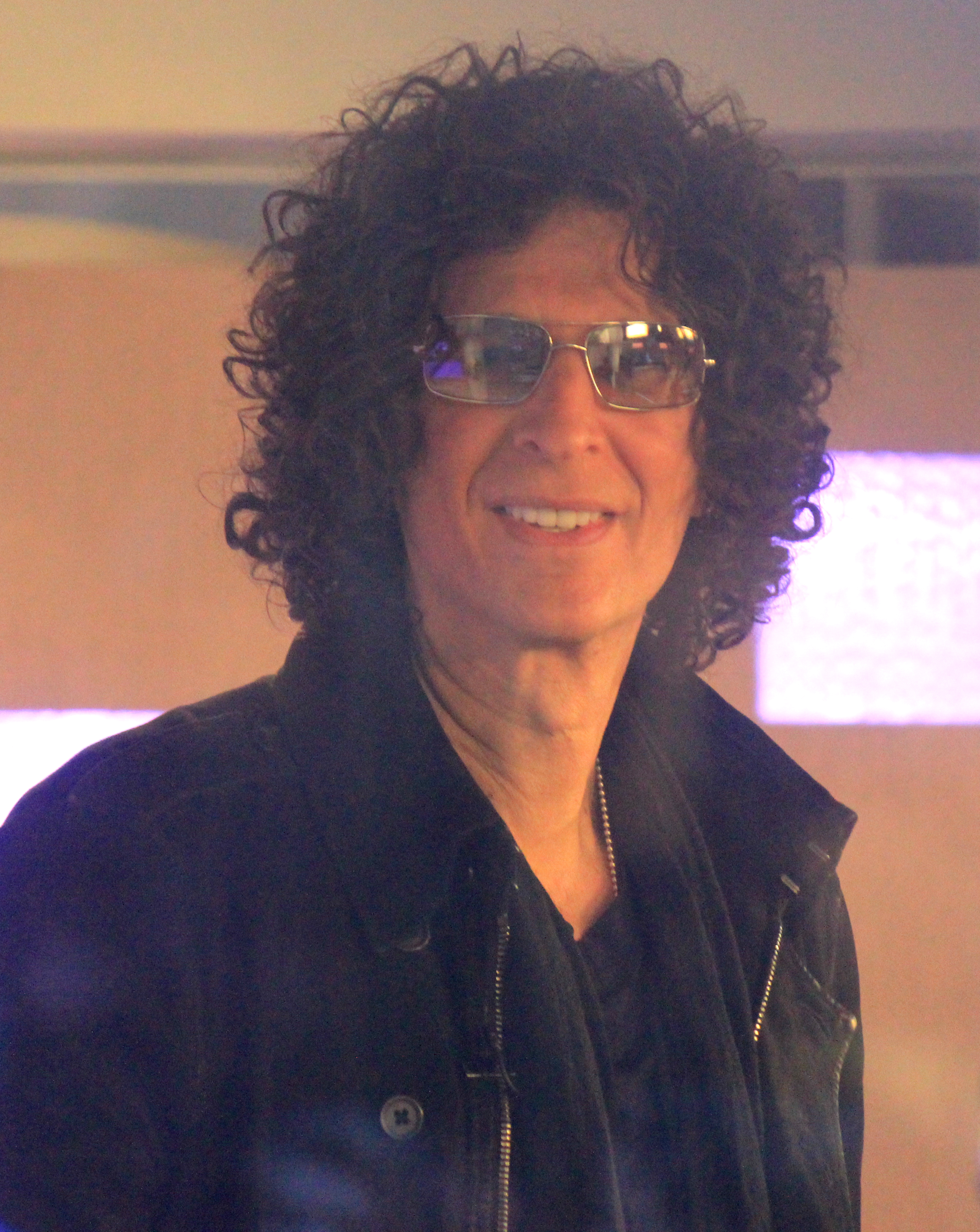 NY 2012 006